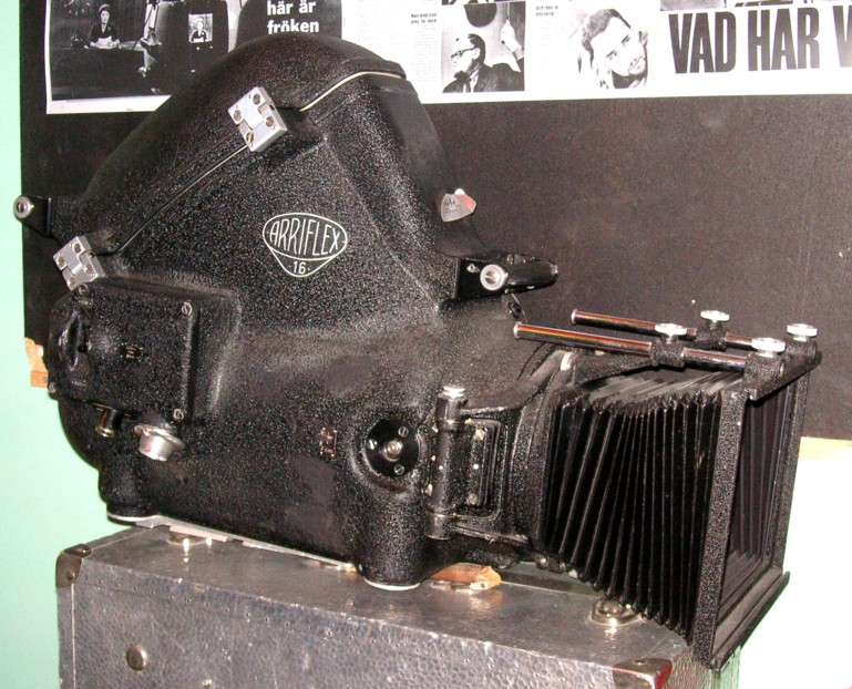 Blimp für die Arri 16 im Kinomuseum in Säter / Schweden